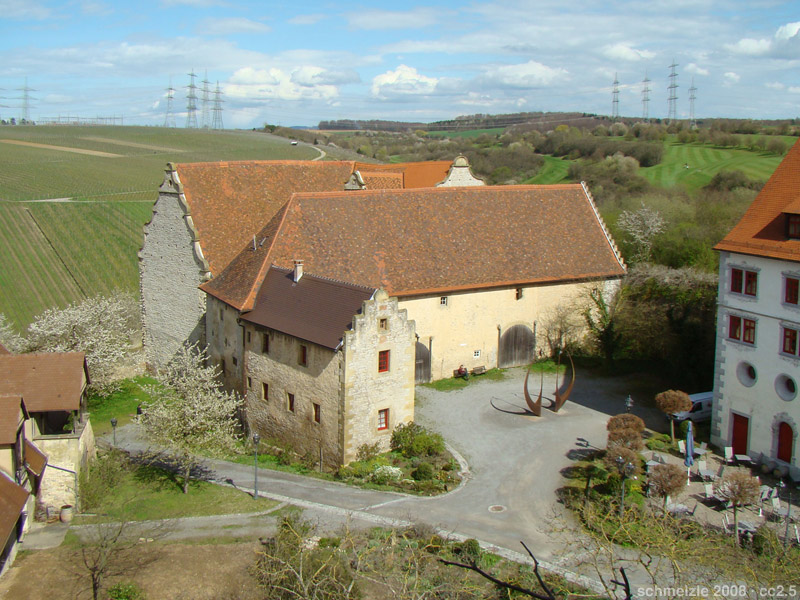 Wirtschaftsgebäude (Zehntscheuer) von Schloss Liebenstein bei Neckarwestheim